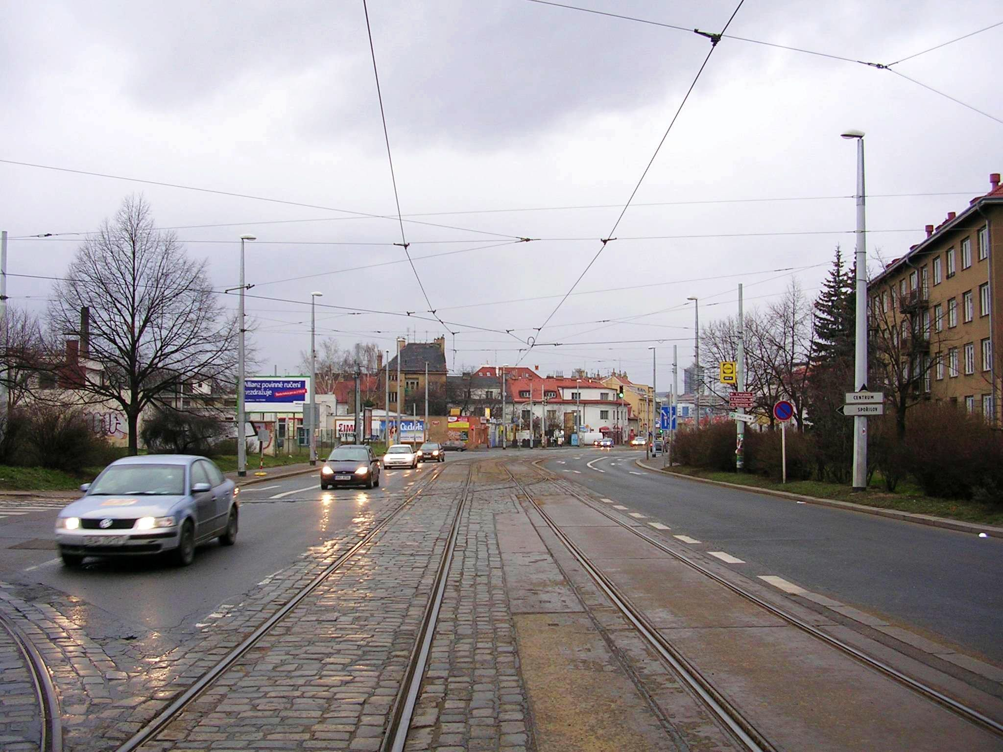 Praha, Strašnice: Průběžná ulice, pohled od Radošovické ul. směrem k ul. Ke Strašnické